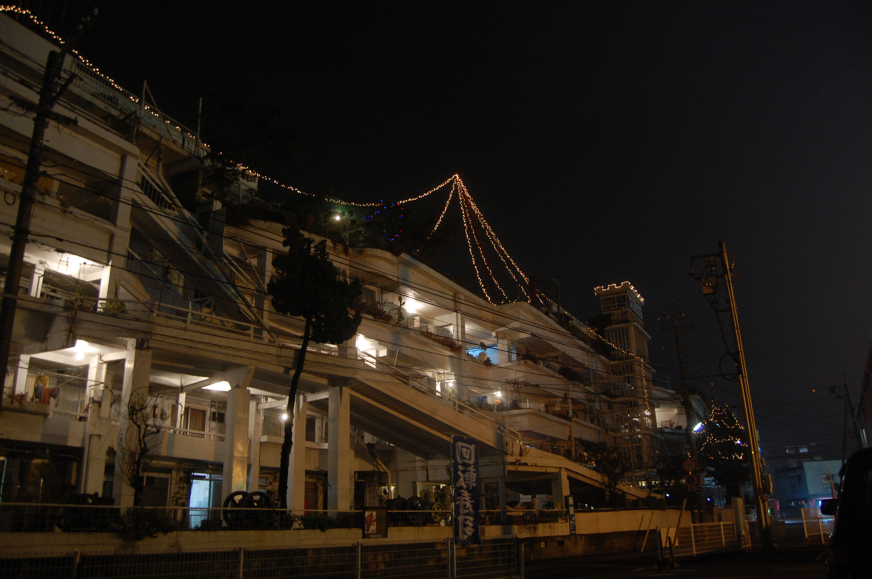 Sawaman,KOCHI